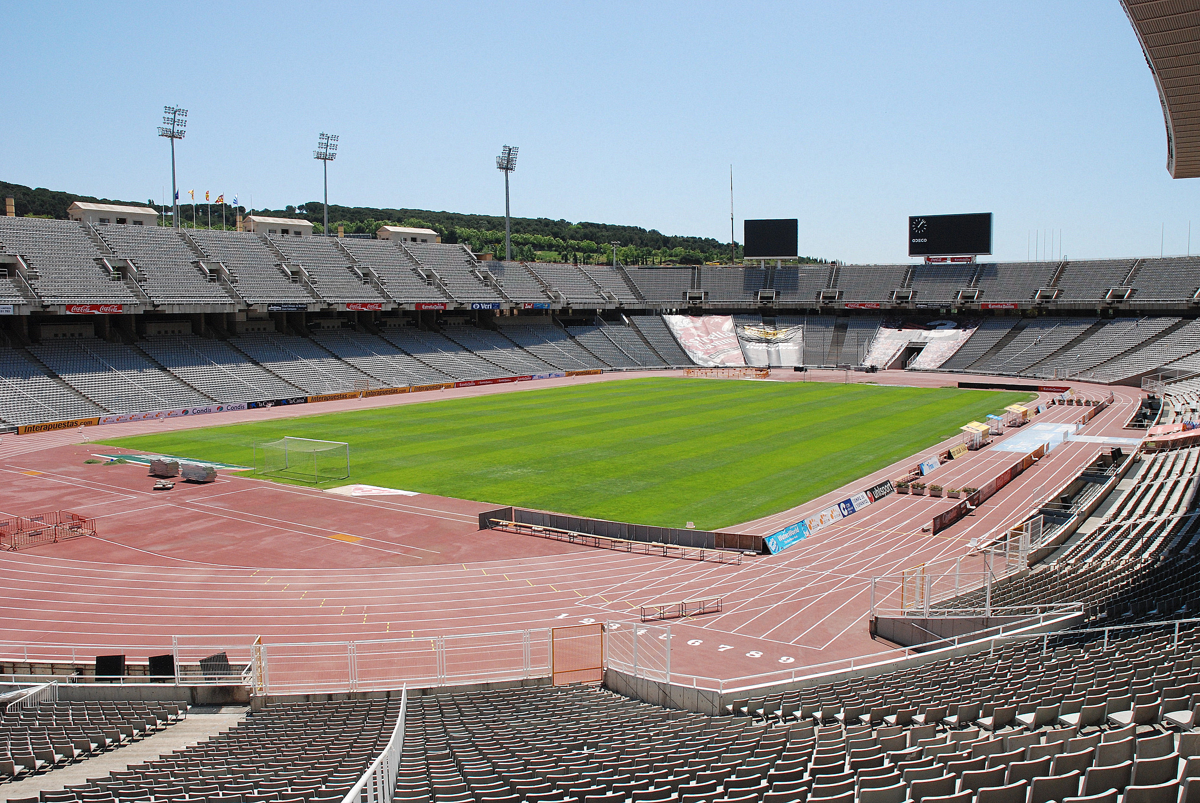 Het Olympisch stadion Lluís Companys te Barcelona